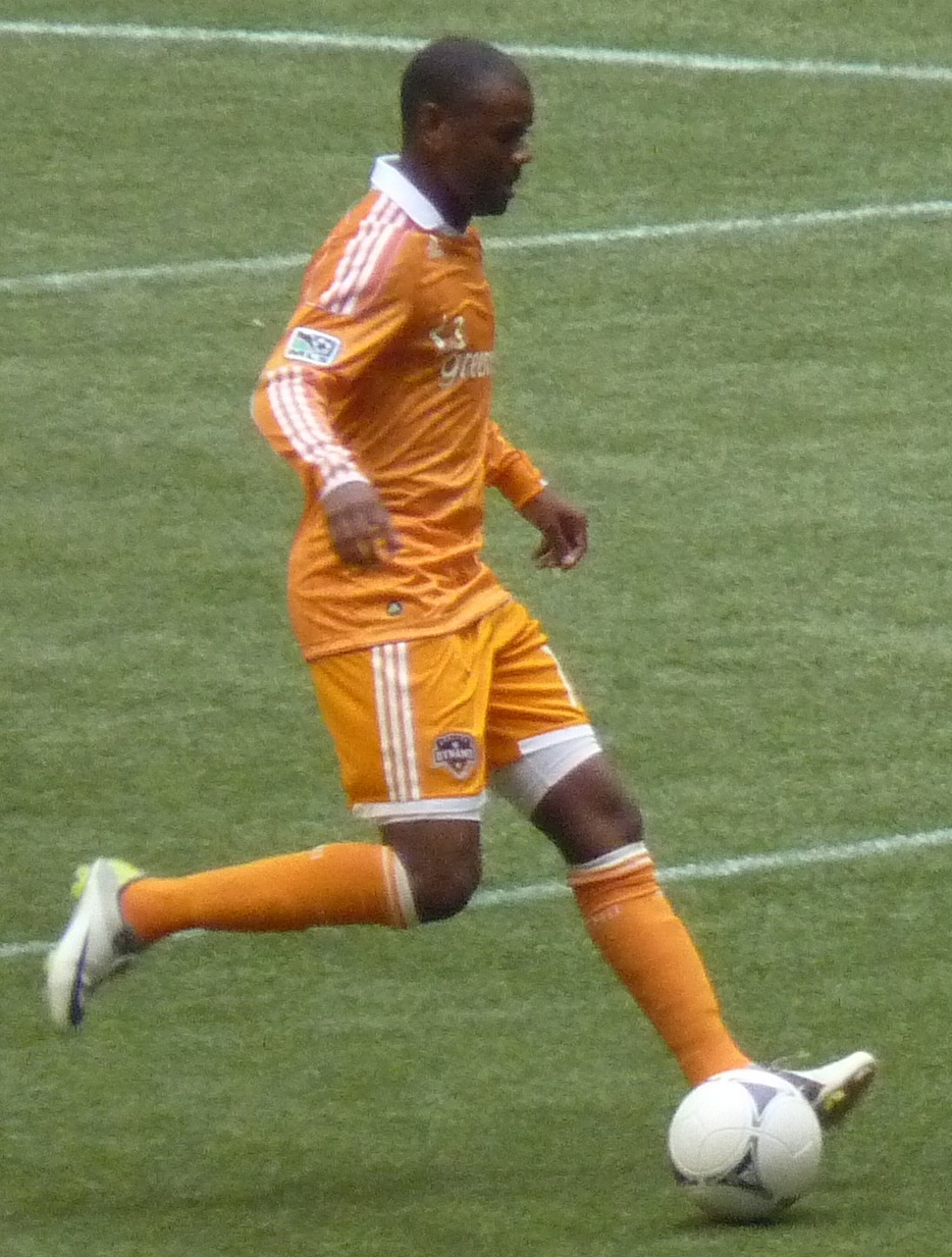 Van vs Hou, 10-Jun-2012